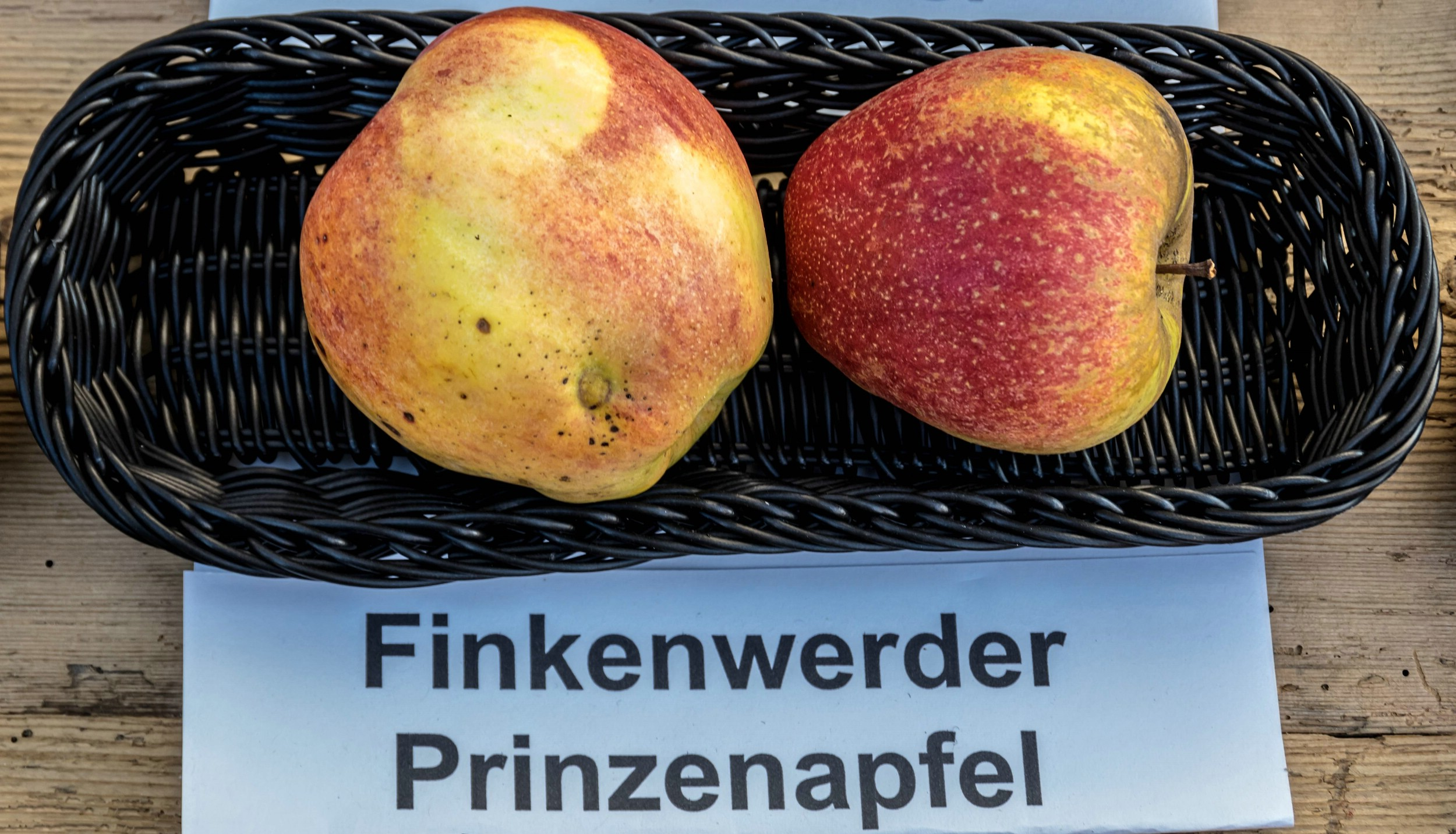 Alte Apfelsorten, von denen es im Badischen noch tragende Bäume gibt. Alle Aufnahmen au dem Oktober 2015